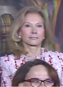 Acto de imposición de las Grandes Cruces de la Orden Civil de Alfonso X el Sabio.